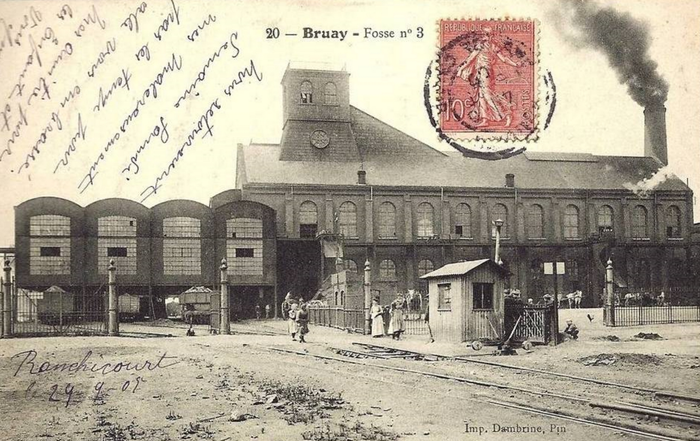 La Fosse n° 3 - 3 bis - 3 ter de la Compagnie des mines de Bruay était un charbonnage constitué de trois puits situé à Bruay-la-Buissière, Pas-de-Calais, Nord-Pas-de-Calais, France.